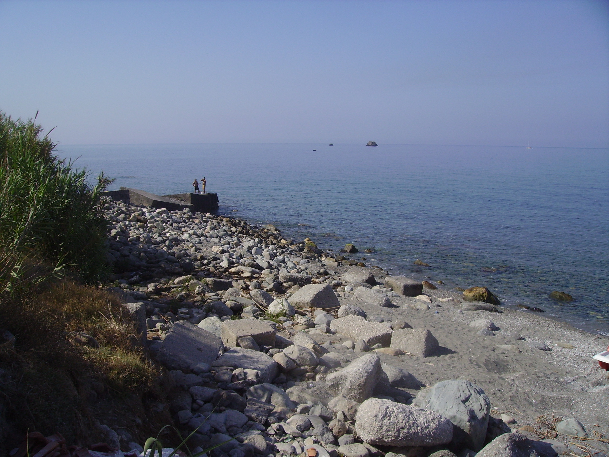 Foce del fiume Verre a Belmonte Calabro